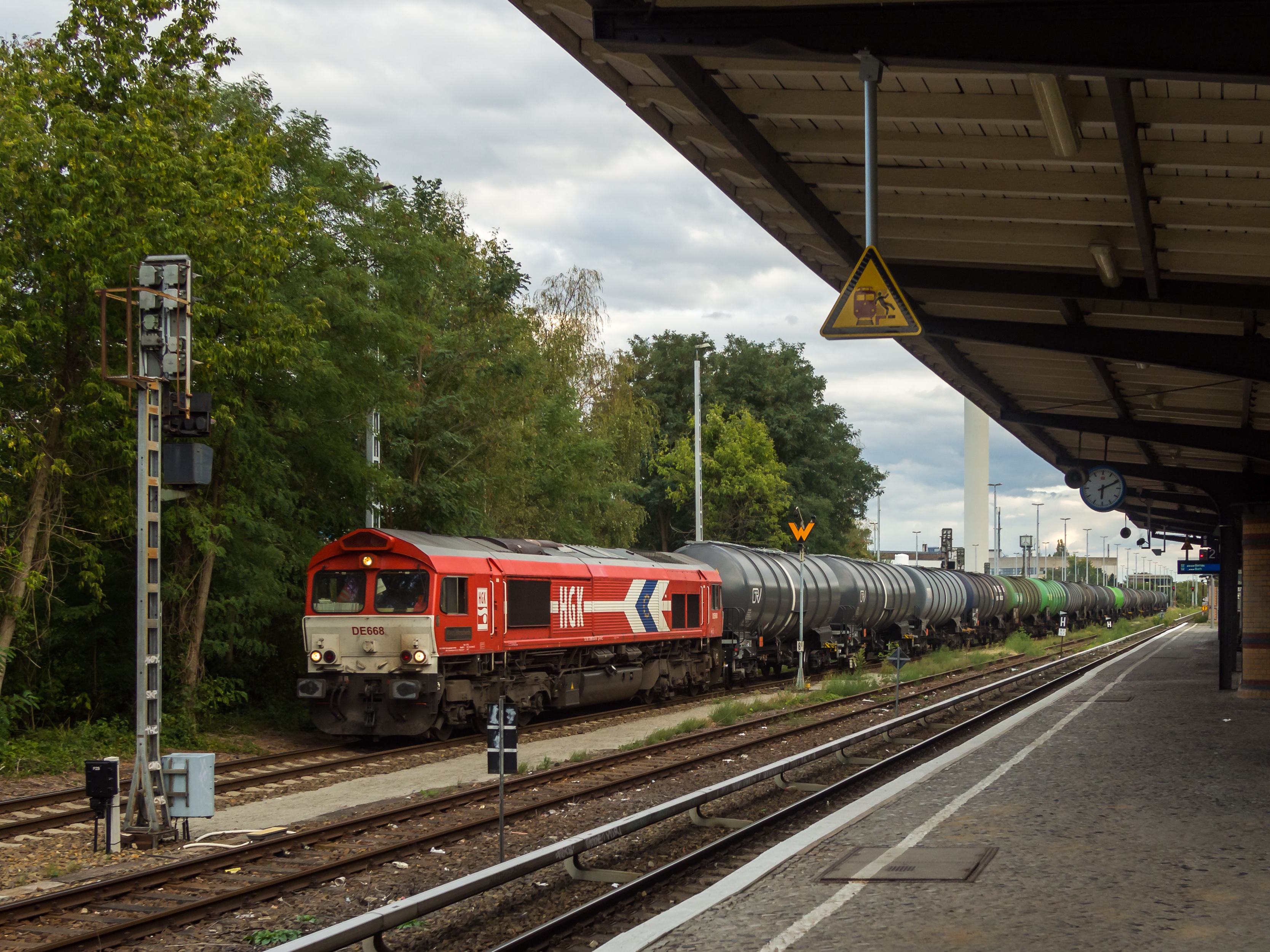 Ein Dieselzug hat den Anschluss der Oiltanking an der Dresdner Bahn in Berlin bedient und im Bahnhof Marienfelde Kopf gemacht. Jetzt verlässt er den Bahnhof in Richtung Abzweig Mariendorf über die S-Bahnstrecke.